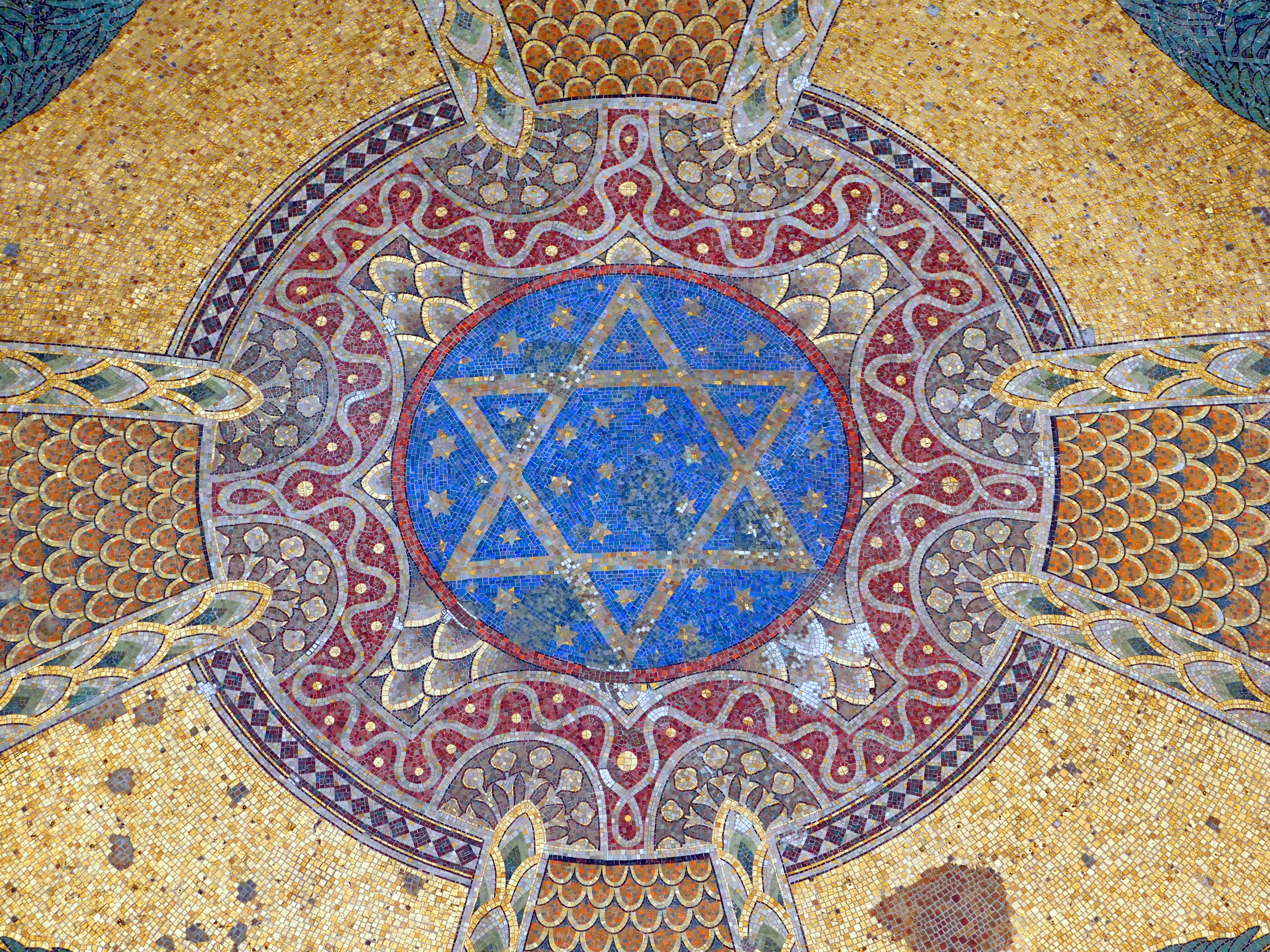 Szczegóły mozaiki na kopule mauzoleum(2)